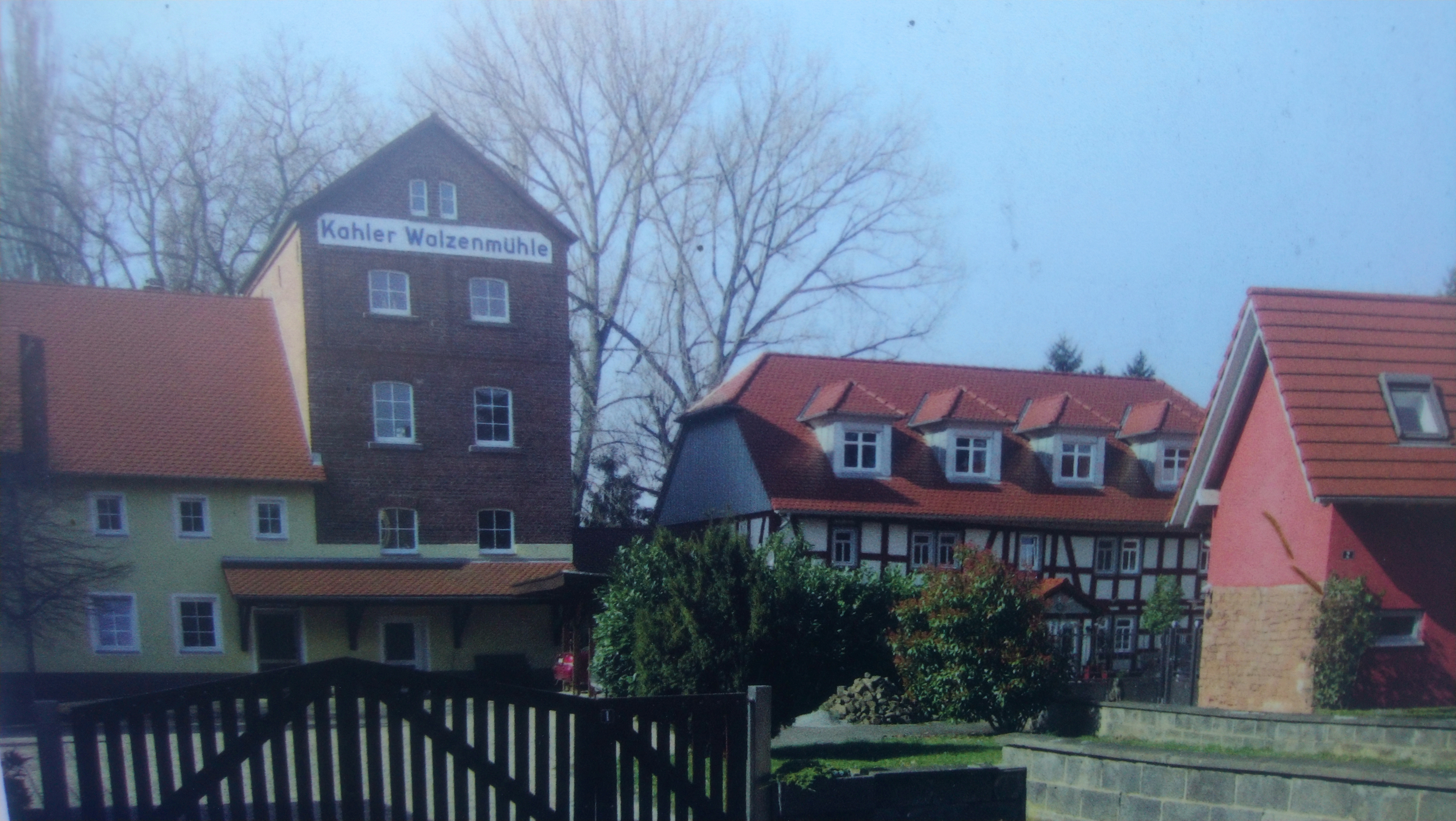 Die untere Fallermühle in Kahl am Main